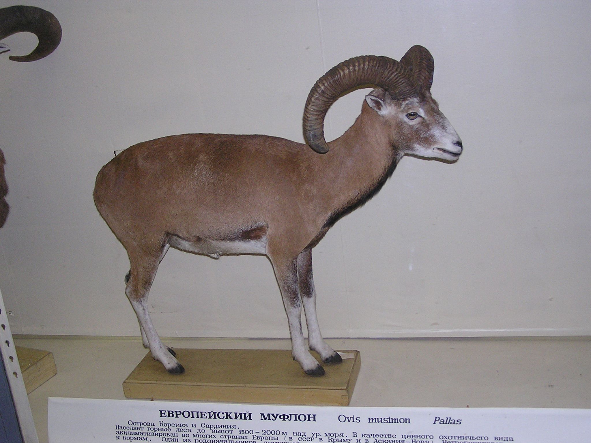 Зоологический музей в Санкт-Петербурге. Европейский муфлон